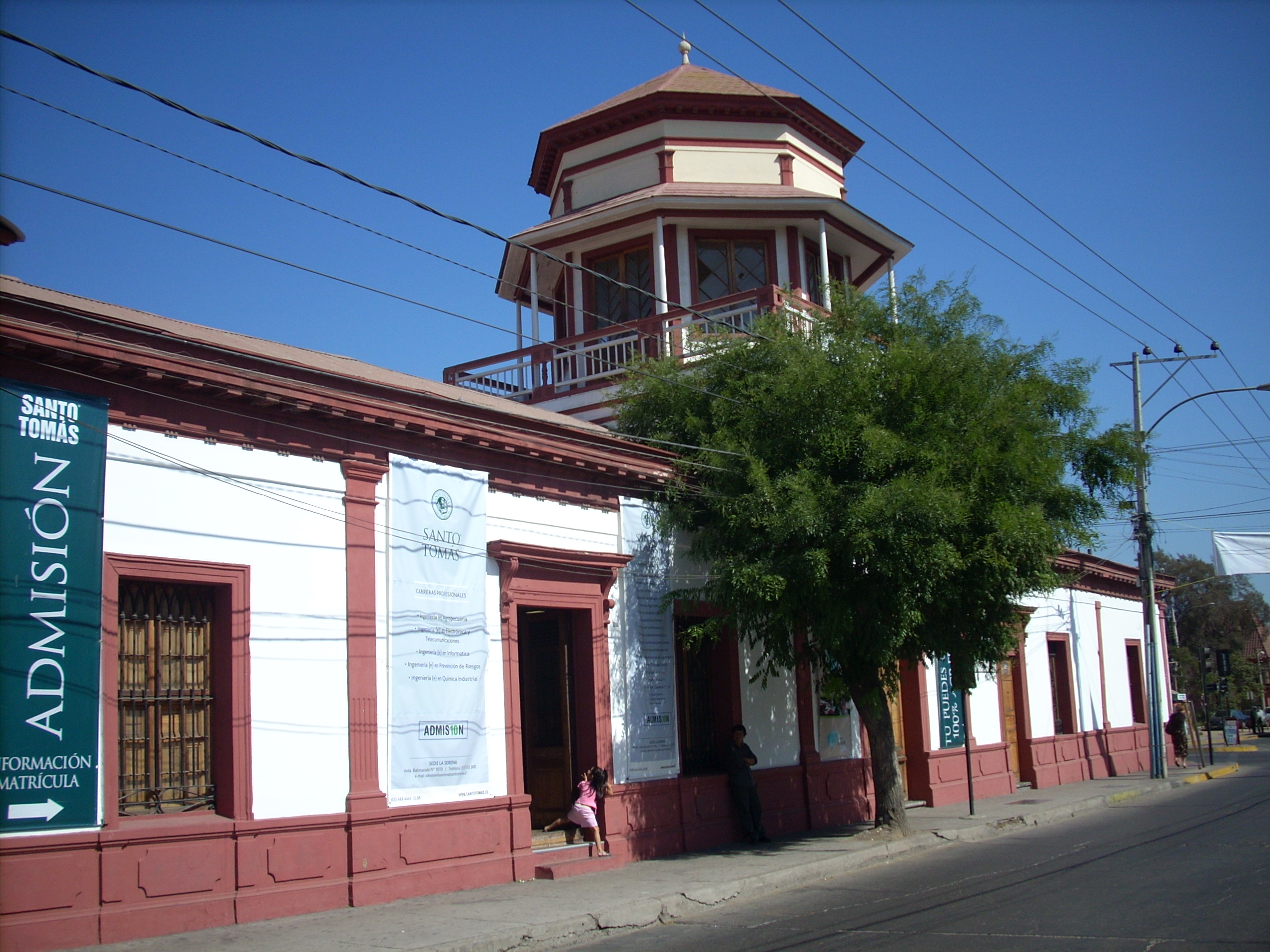 Casa Carmona This is a photo of a national monument in Chile: 599